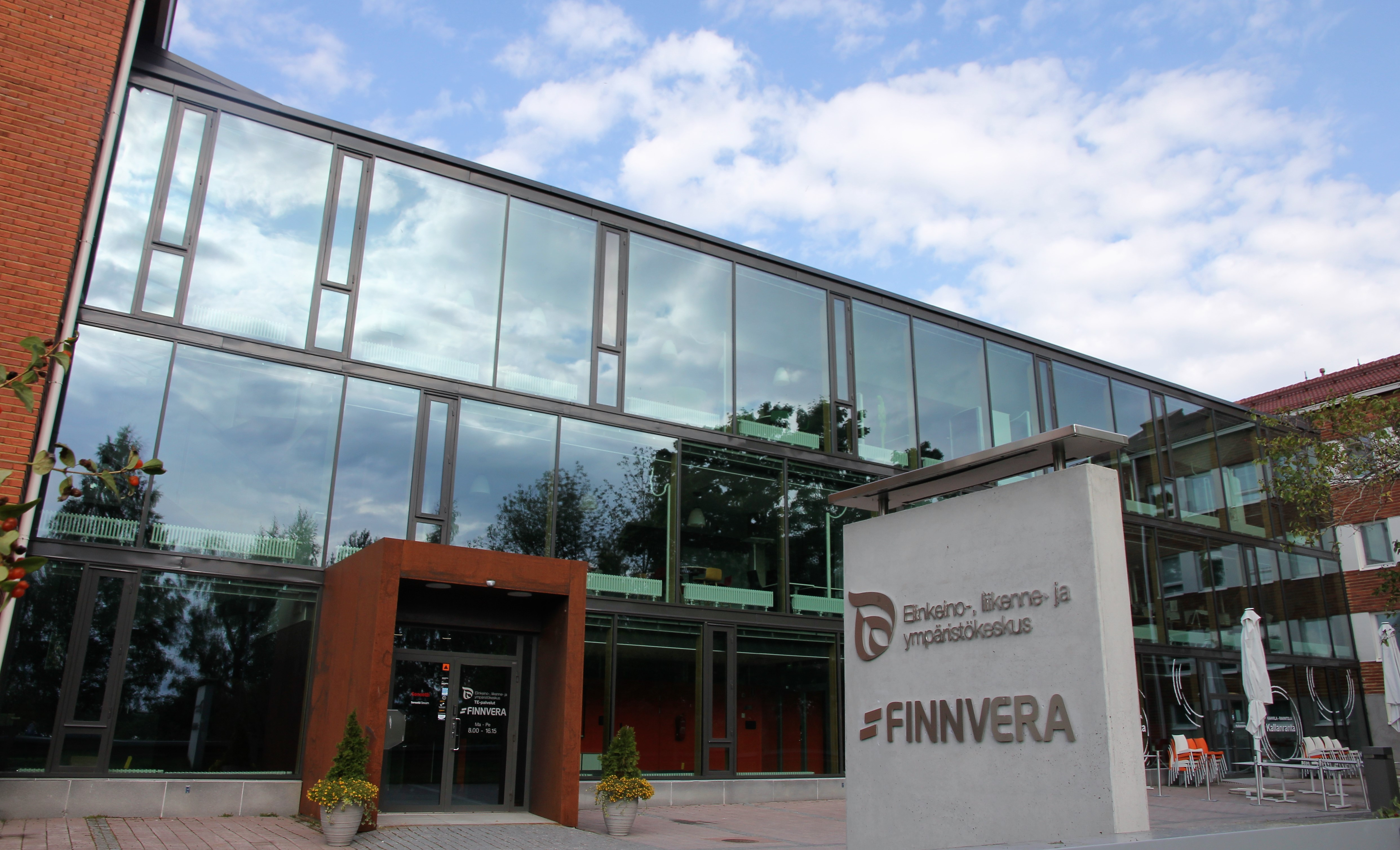 Rahoitusyhtiö Finnveran pääkonttori ja Pohjois-Savon ELY-keskus toimivat osoitteessa Kallanranta 11, Kuopion Väinölänniemen kaupunginosassa. Finnveran pääkonttori sijaitsee rakennuksessa, joka on yksi usean toimistokäytössä olevan rakennuksen kokonaisuudesta Kuopion Piispanpuiston ja Kuopionlahden (Väinölänniemen kaupunkipuiston) välisessä korttelissa. Rakennukset kuuluvat valtakunnallisesti merkittävänä rakennetun ympäristön kohdealueena tunnettuun (RKY-kohde) Kuopion Piispanpuiston ympäristö ja kuurojen koulu alueeseen.